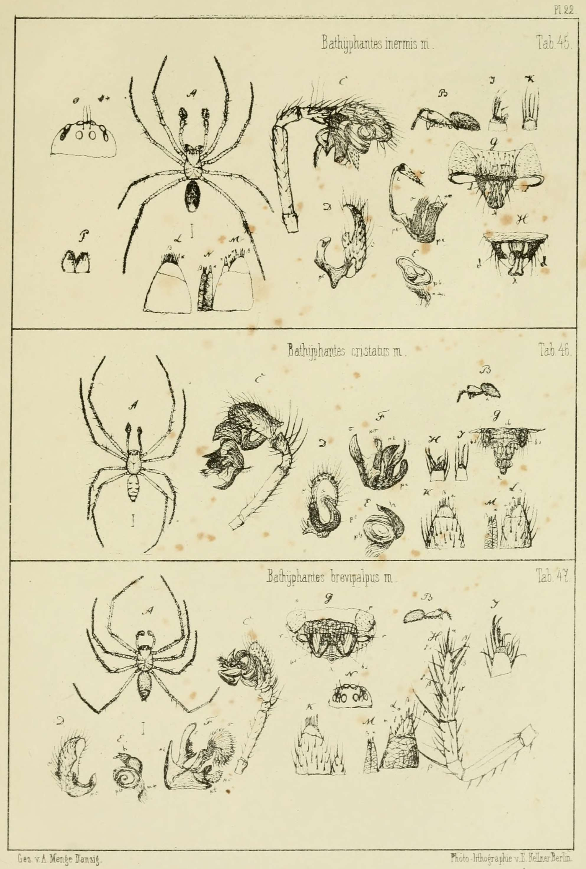 Anton Menge: Preussische Spinnen. I. Abtheilung. Tafel 22 - 45. Bathyphantes inermis m. 46. Bathyphantes cristatus m. 47. Bathyphantes brevipalpus m.. In: Schriften der Naturforschenden Gesellschaft in Danzig. Erster Band drittes und viertes Heft. Druck von A. W. Kafemann, Danzig 1866